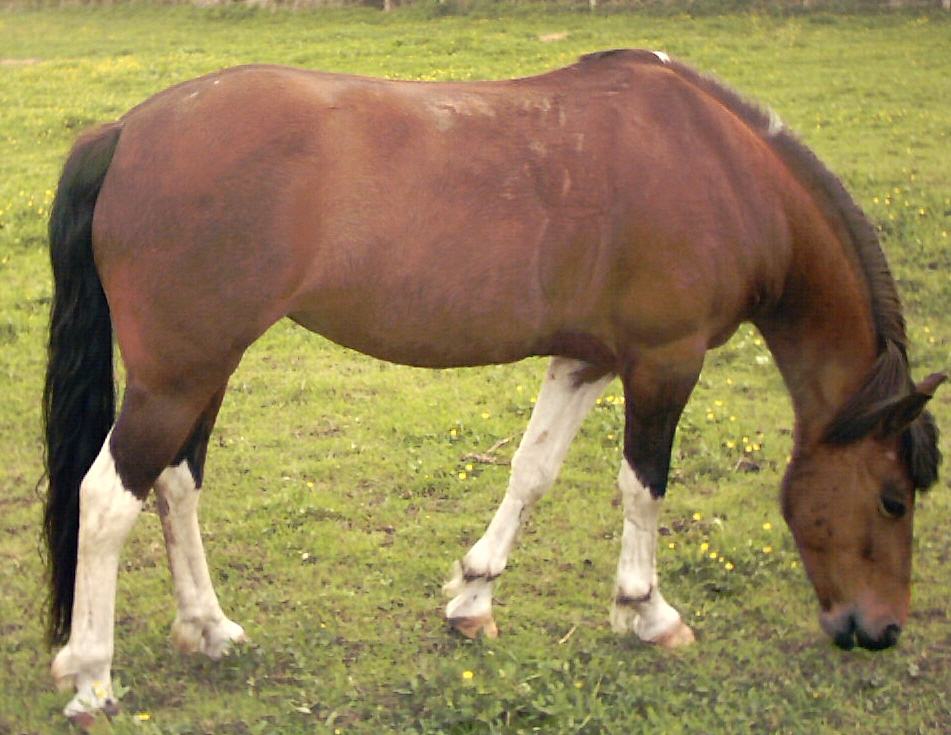 8 jährige Lewitzerstute "Anna" auf der Weide.